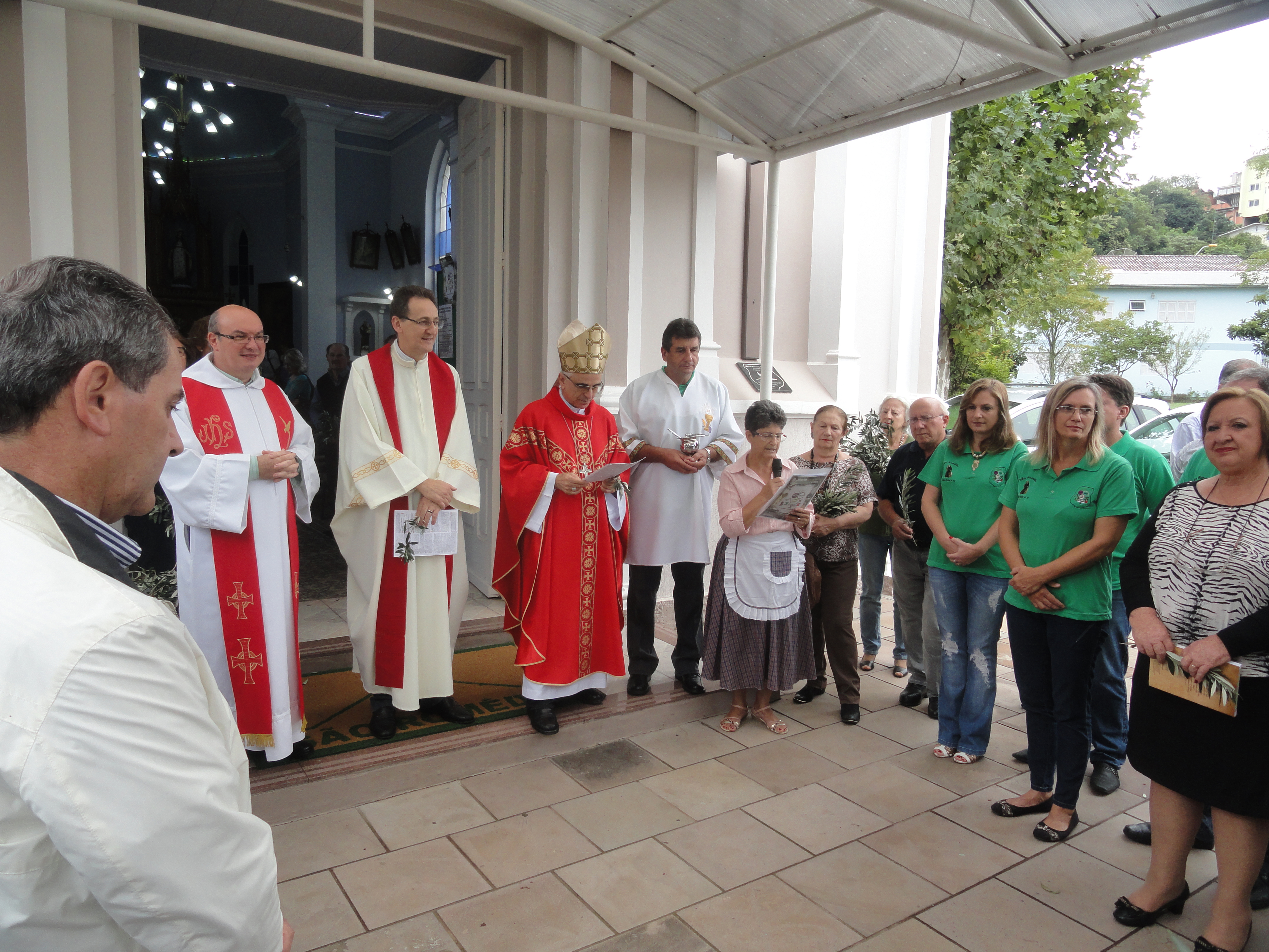 Missa celebrando os 140 anos de fundação da Comunidade São Romédio em Caxias do Sul, com a presença do bispo diocesano dom Alessandro Carmelo Ruffinoni e outros sacerdotes.